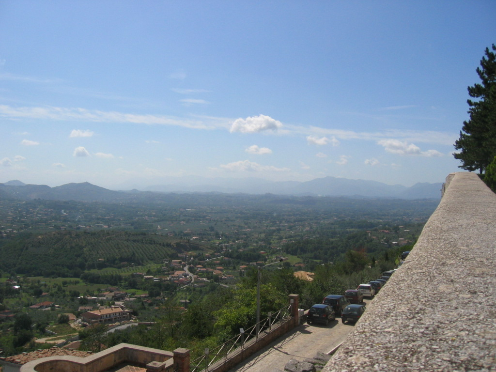 Blick über das Saccotal von latri aus gesehen.